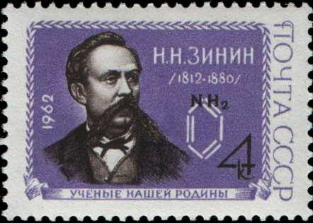 Н.Н.Зинин (1812-1880). К 150-летию со дня рождения.Почтовая марка СССР 1962г.